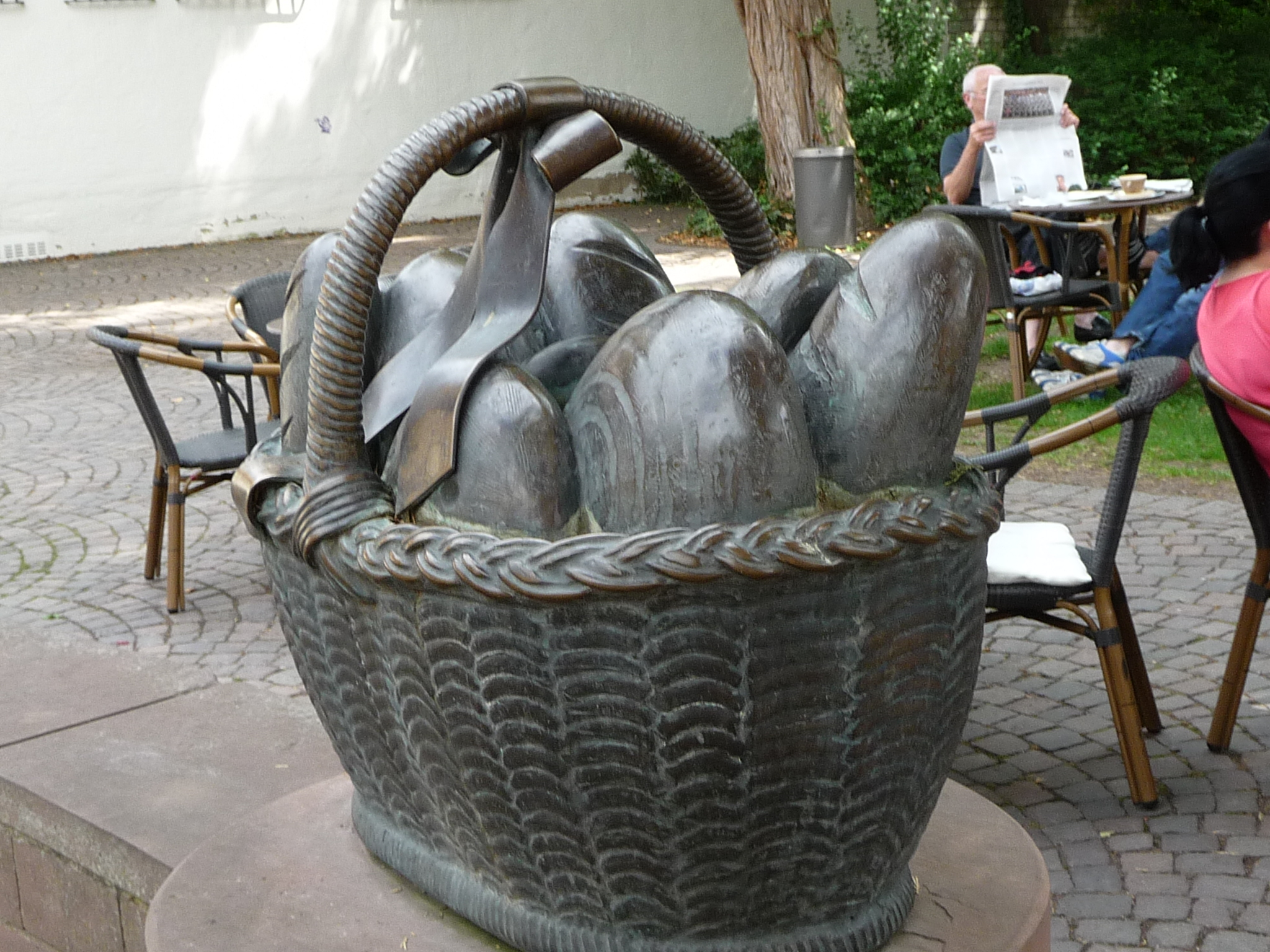 Bürgerbrunnen in Herxheim (Pfalz)